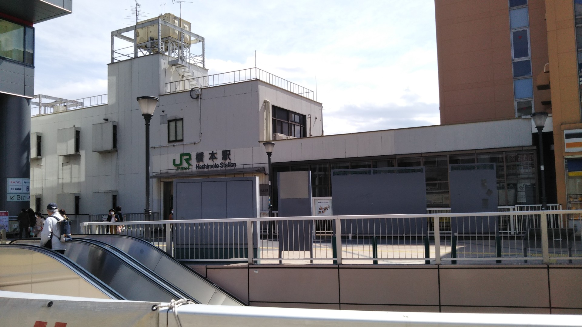 橋本駅の北口入口